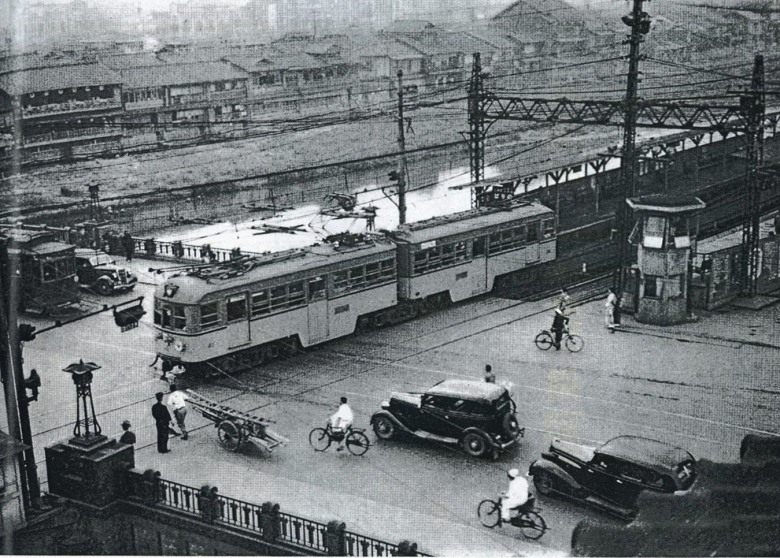 四条通りを横切り京阪四条駅に入るびわこ号61。踏切では京都市電が待っている。